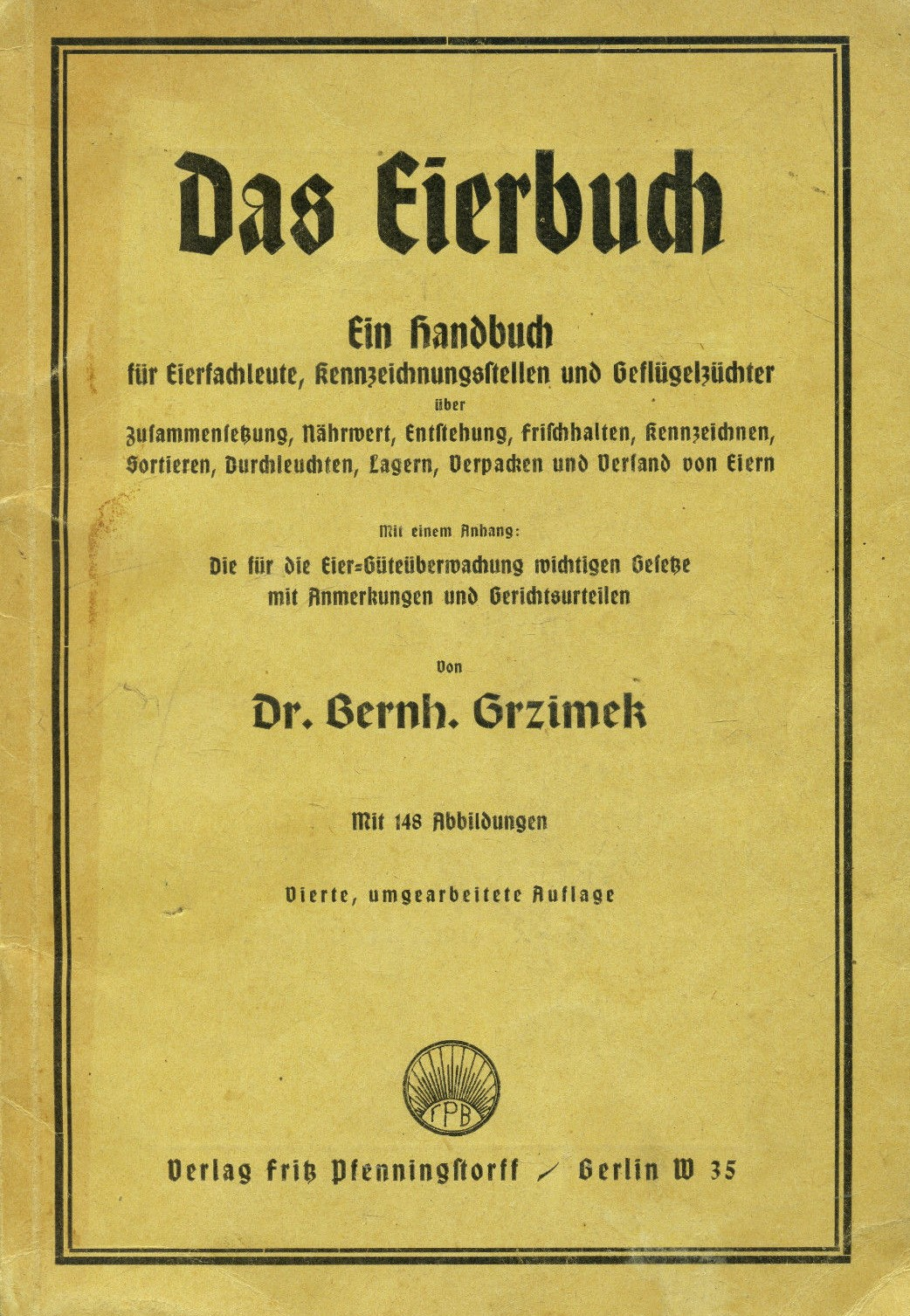 Dr. Bernhard Grzimek: Das Eierbuch, Vierte Auflage, Verlag Fritz Pfenningstorff, Berlin, 1938